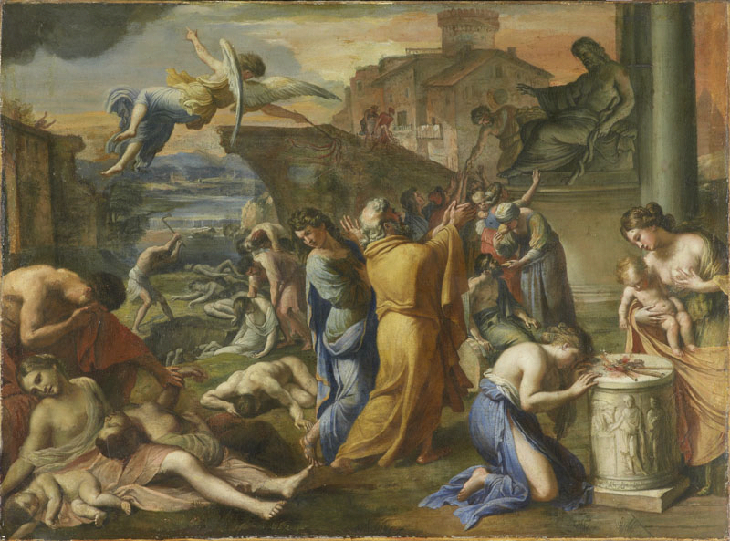 Чума в Афинах. Картина Франсуа Перье. 1640. Дижон, Музей изобразительных искусств , инв. 4902